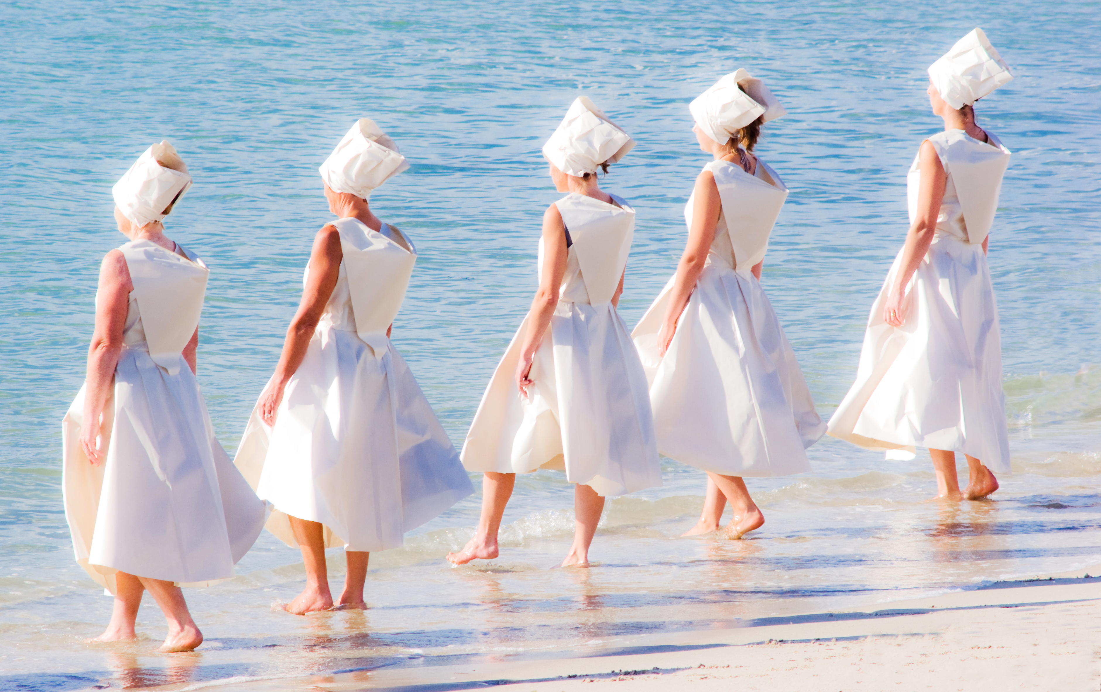 Journée spectacles « A domicile ». Projet Matter de Julie Nioche en 2008